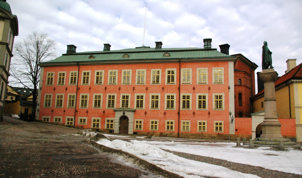 Stenbockska palatset (The Stenbock Palace), Riddarholmen, Stockholm